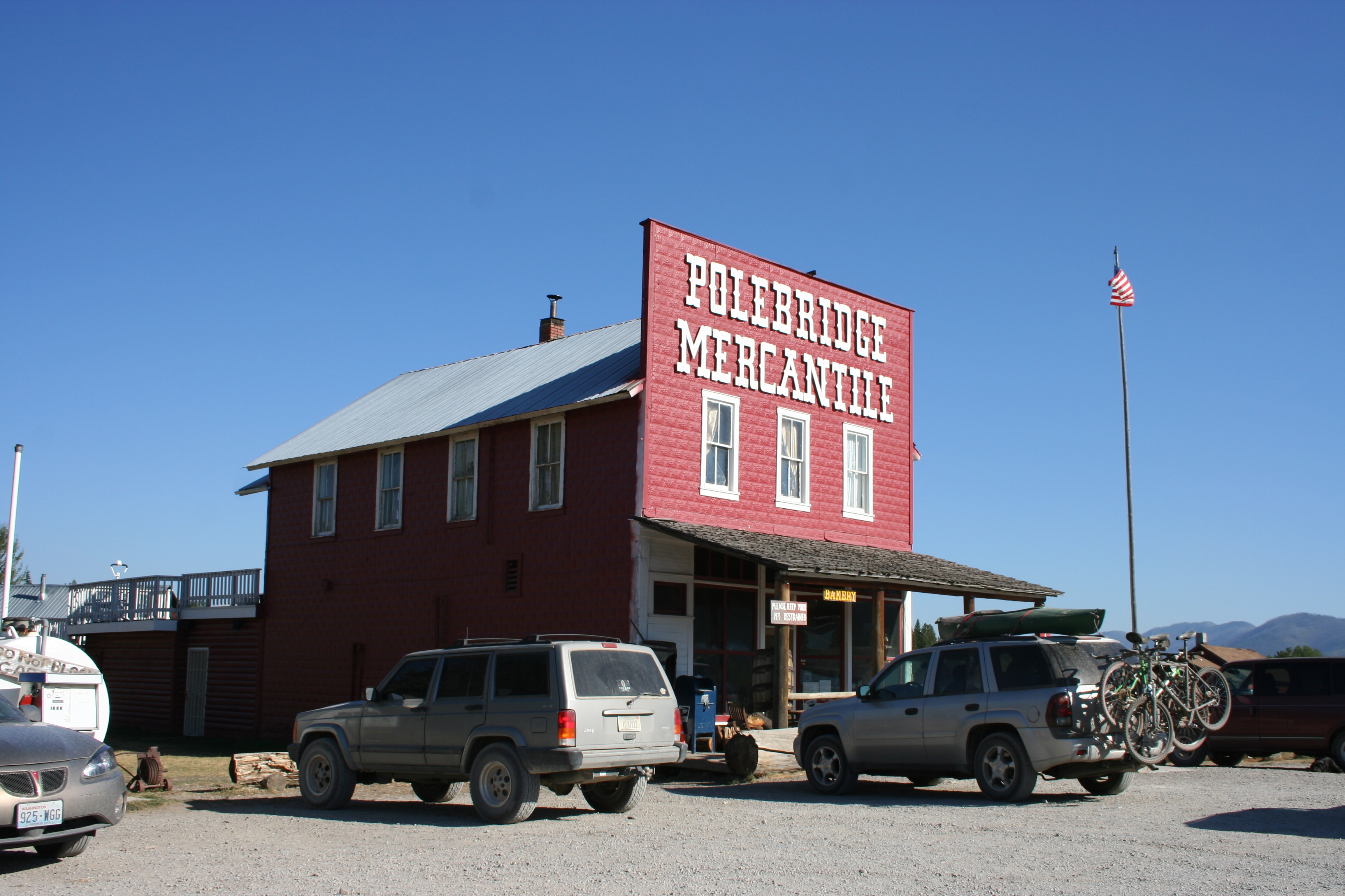 Polebridge, Montana